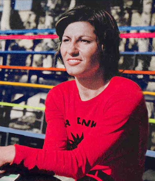 Maryam Sedarati, 1974 Asian Games in Tehran